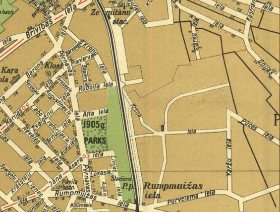 Kroņu iela 1933. gada Rīgas kartē